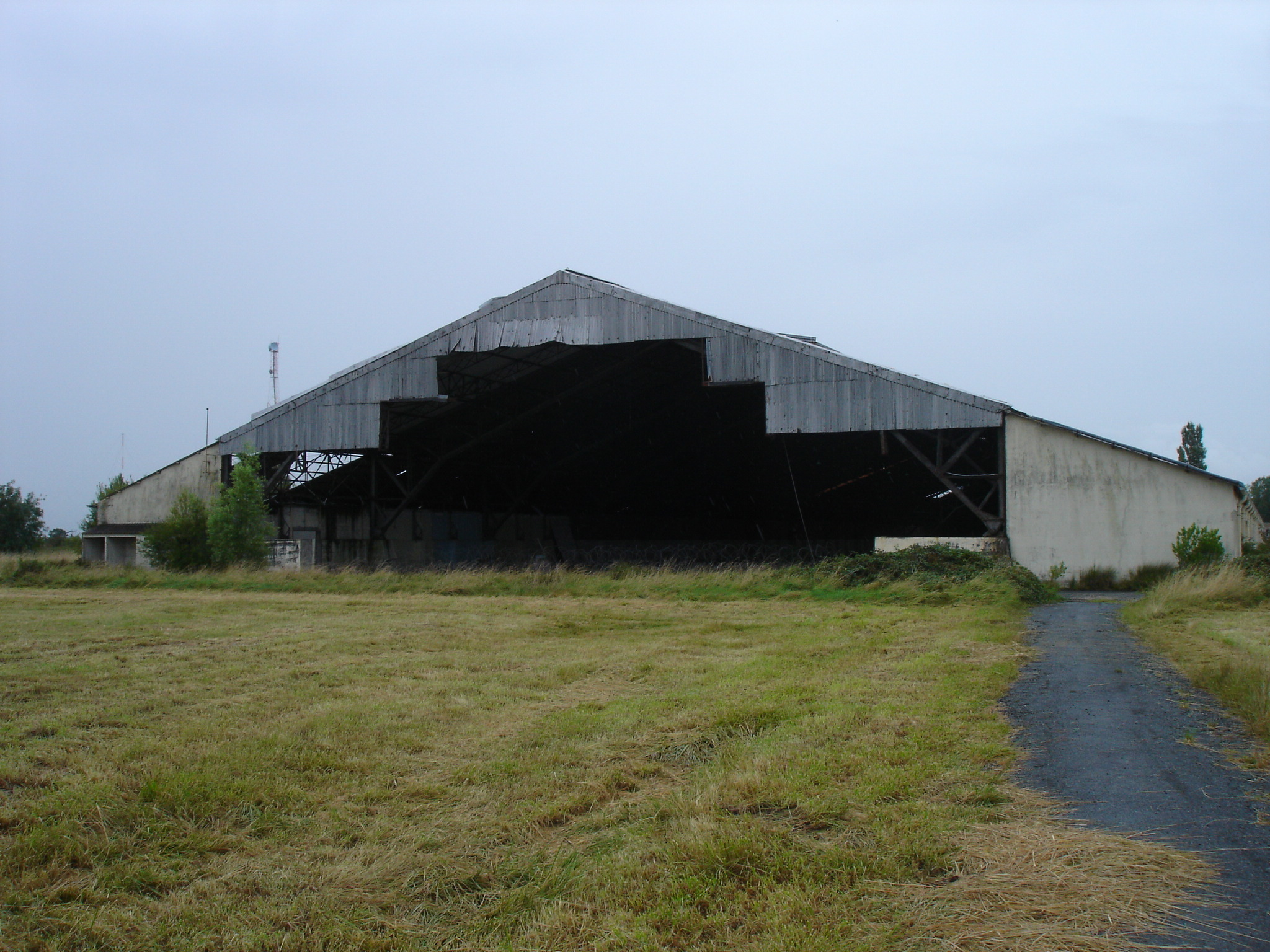 Hangar Astra in Rochefort (Charante), Frankreich